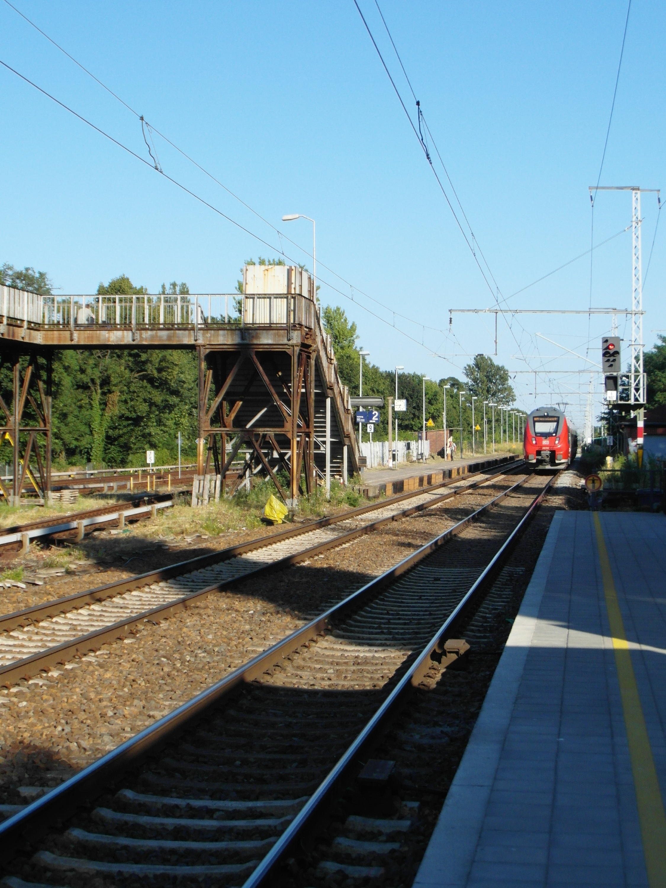 S-Bahnlinie S3